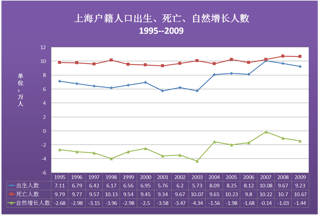 根据上海市公安局相关数据制作